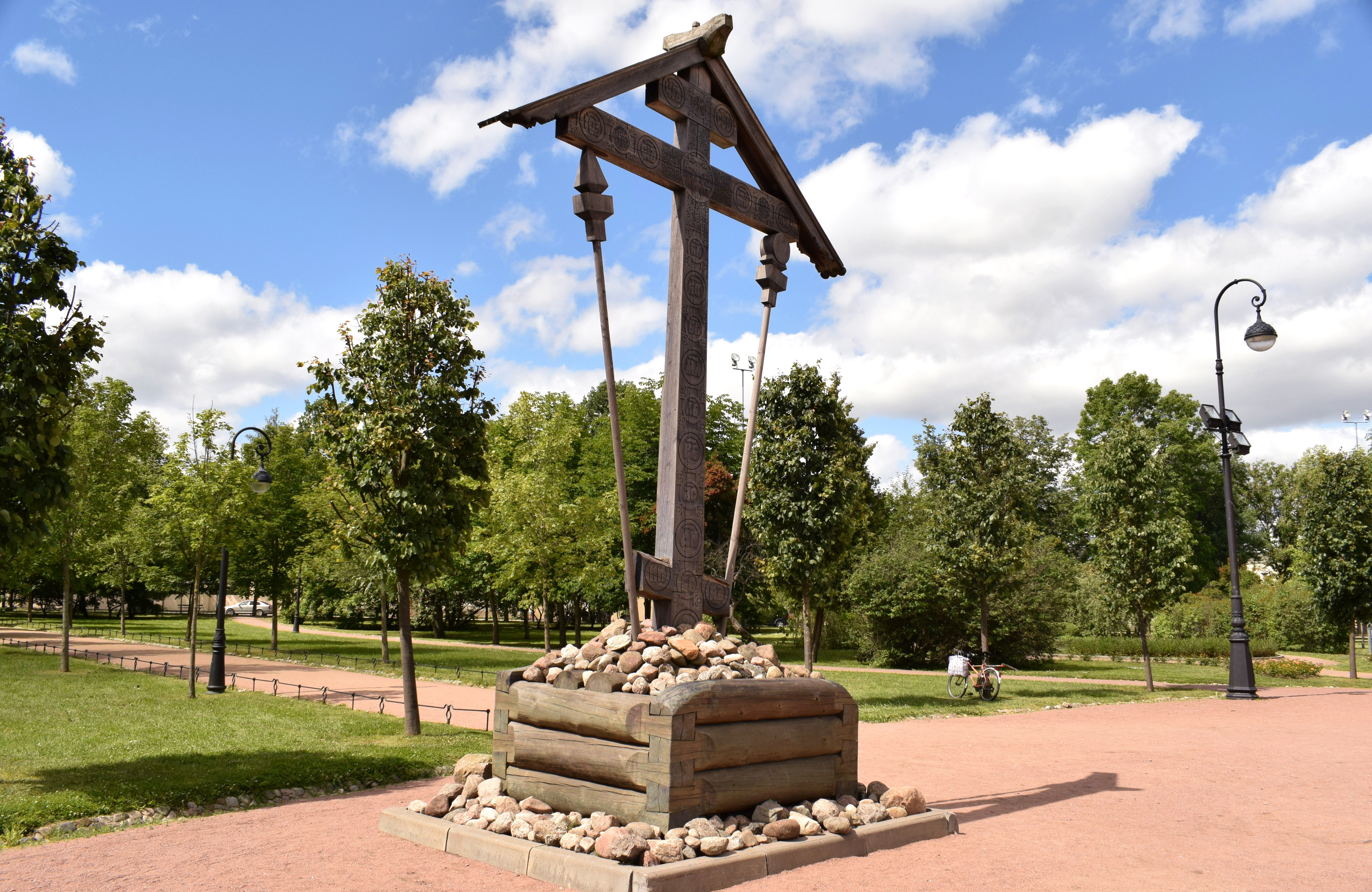 Поклонный крест у Екатерининского собора в Пушкине, Санкт-Петербург